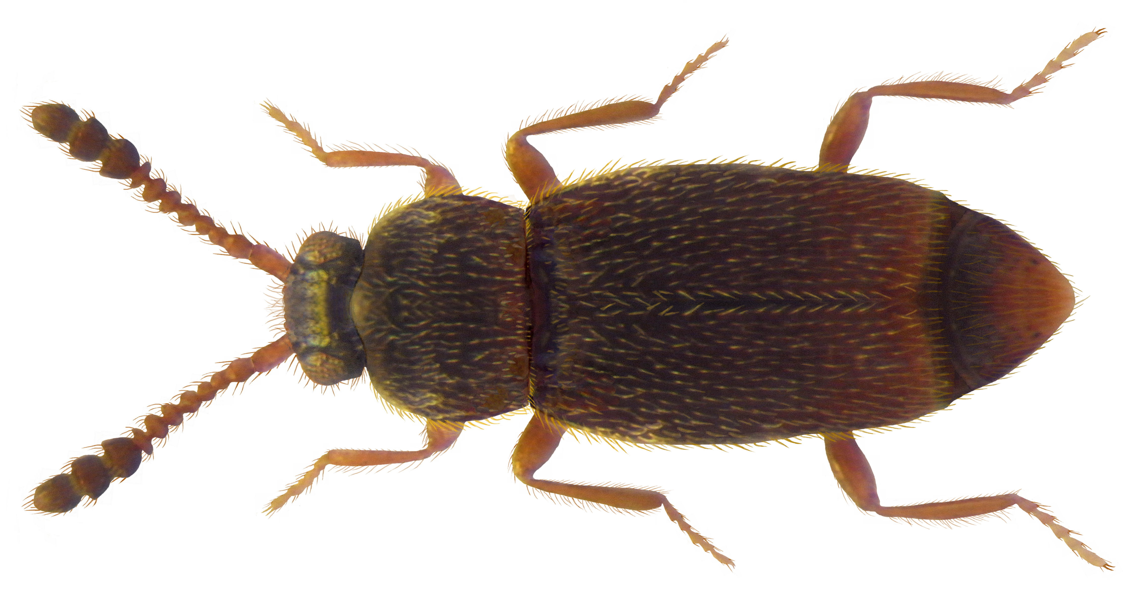 Familie: Scydmaenidae Groesse: 1,15-1,35 mm Verbreitung: Mittel- und Nordeuropa Ökologie: in faulenden Pflanzenabfällen, unter Rinde, in Ameisennestern Fundort: Germania, Thüringen, Hilbersdorf leg.det. A.Weigel, 2001 Photo: U.Schmidt, 2009